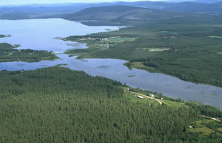 Storsundet Motiv: Övre Lansjärv Nyckelord: Flygbilder, Riksintressen Kategori: Insjömiljöer Storsundet.